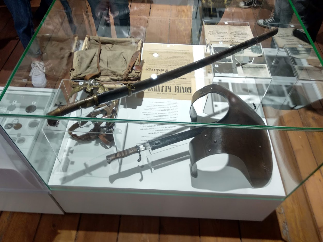 Muzeum Historii Włocławka (2019 r.)